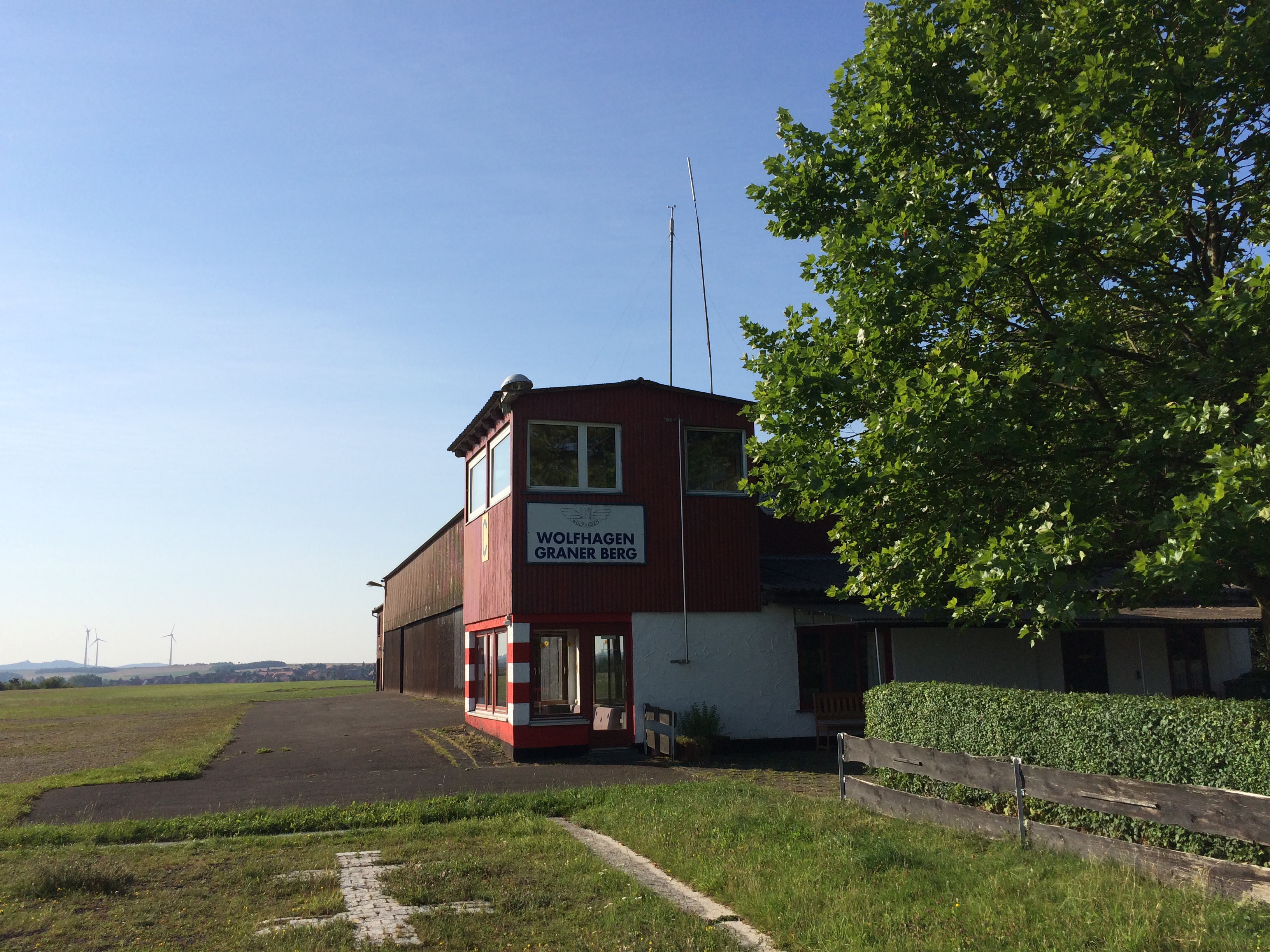 "Terminal" des Flugplatzes Wolfhagen-Graner Berg auf dem Graner Berg, fotografiert vom eingezäunten Aussichtspunkt am Parkplatz